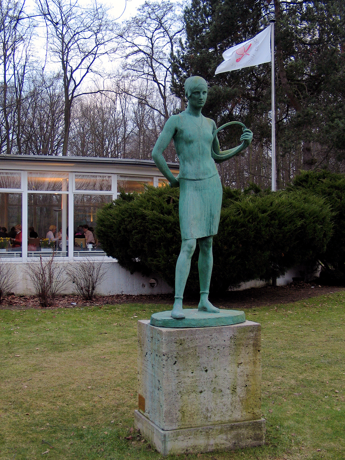 Die Tennisspielerin des Bildhauers Constantin Starck vor dem Café in der später verglasten Veranda des Clubhauses vom Deutschen Tennis Vereins Hannover e.V. ...